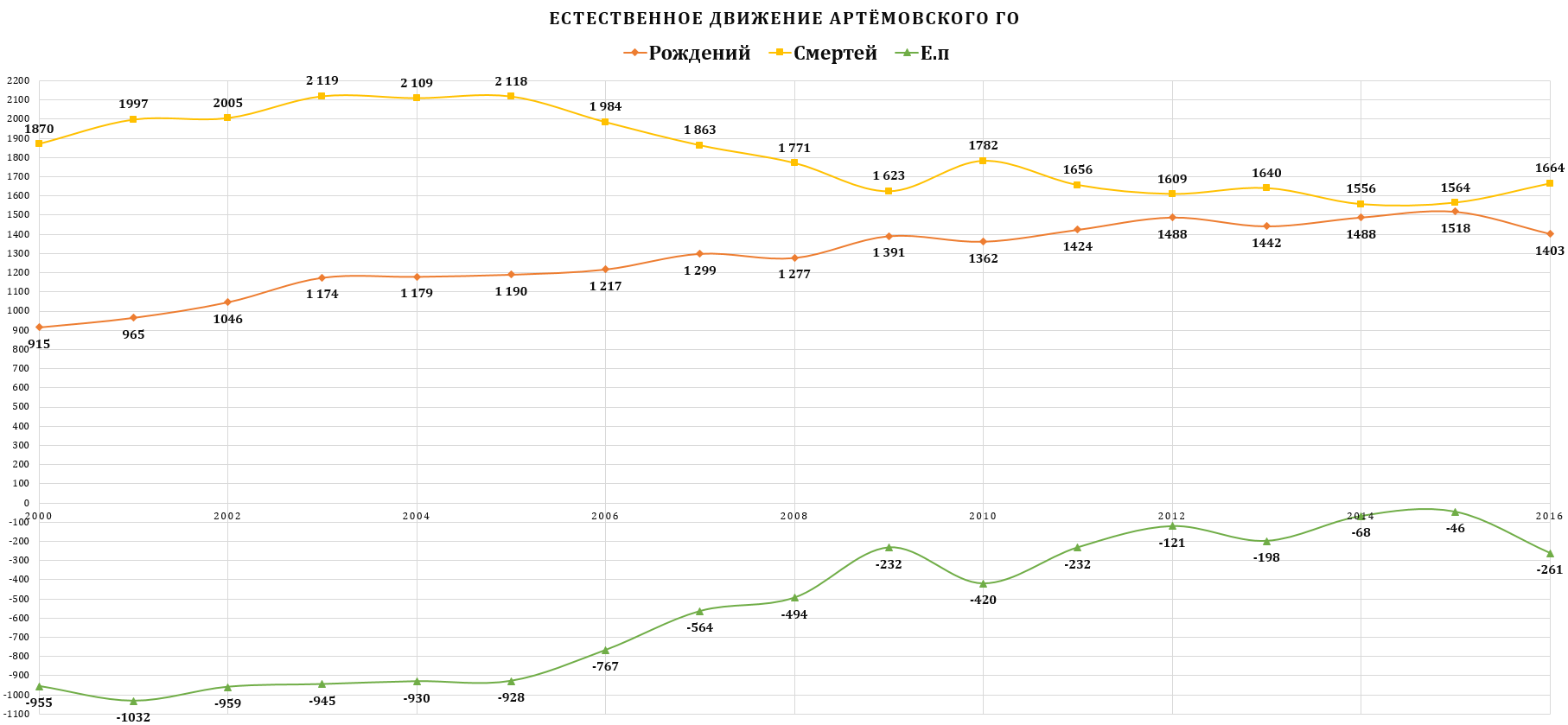 Естественное движение Артемовского ГО 2000-2016